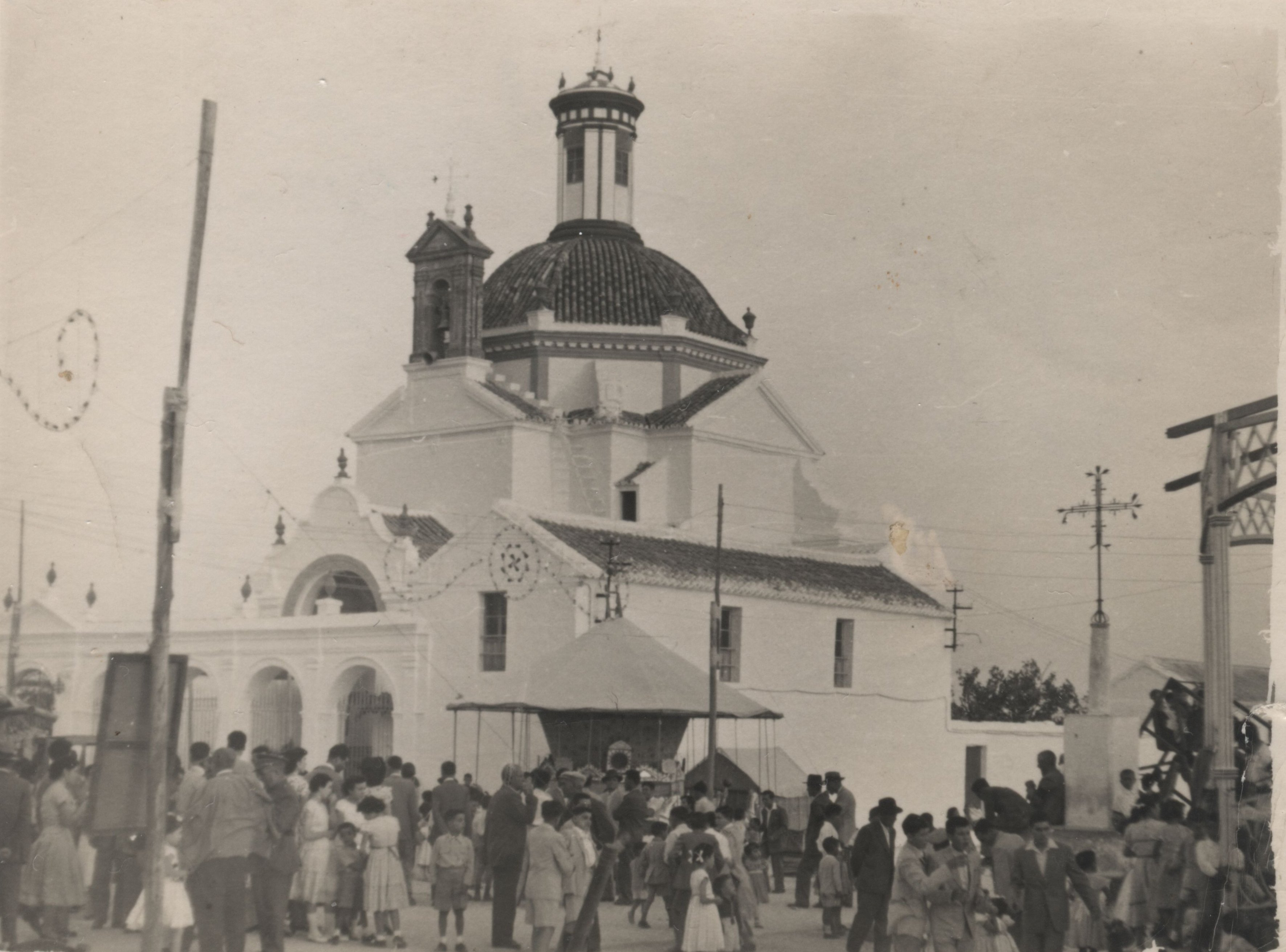 Montalbán de Córdoba durante la celebración de la Feria de Agosto en los años 60. Al fondo, la Ermita de El Calvario.